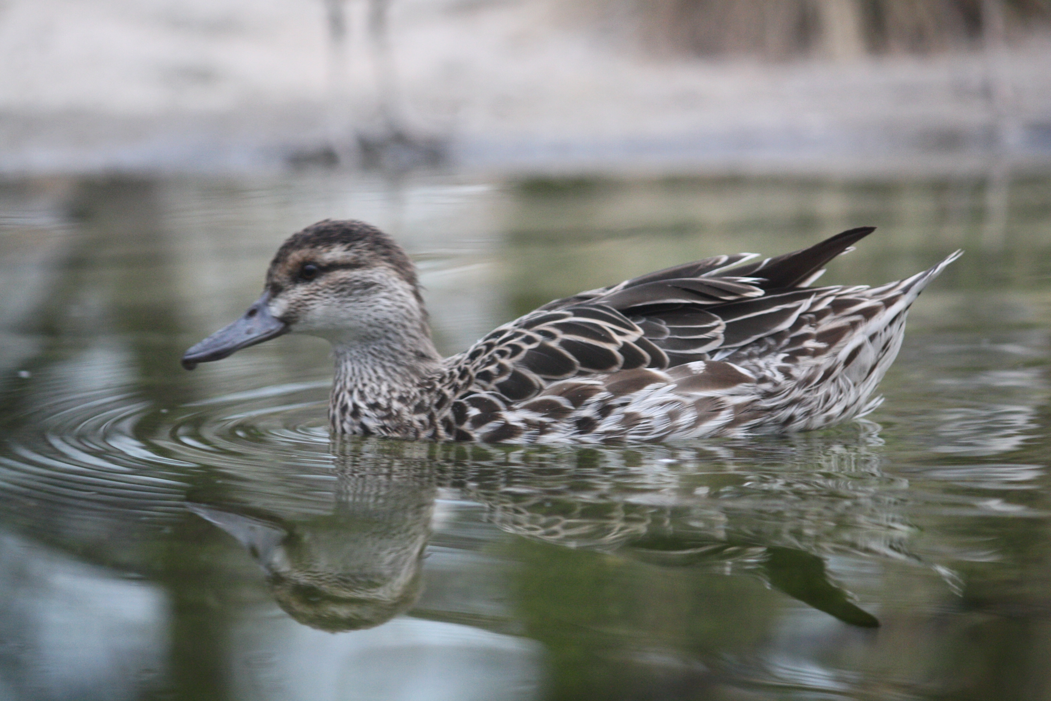 Pražská zoologická zahrada